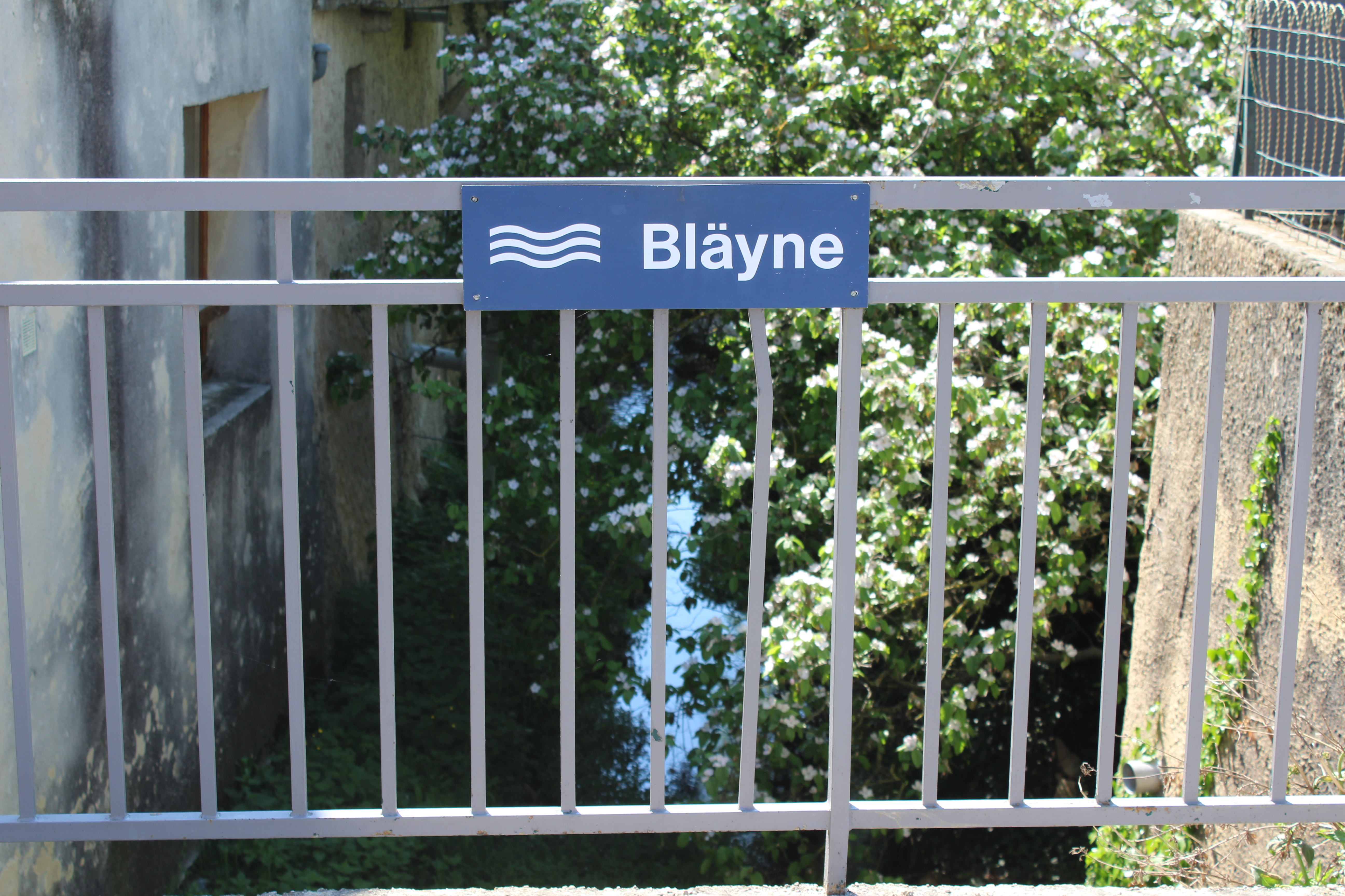 Photographie du ruisseau La Blayne de Piégros-la-Clastre